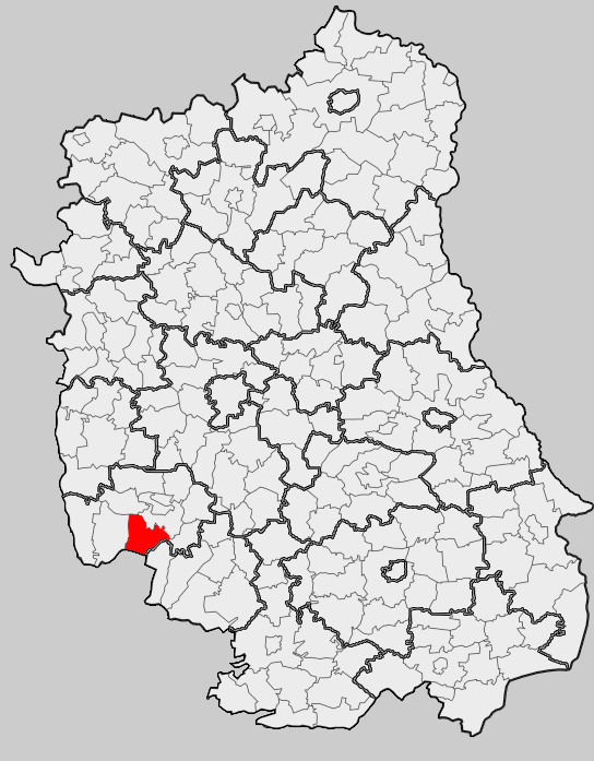 Map of gmina Trzydnik Duży, Kraśnik county, Lublin voivodship Mapa gminy Trzydnik Duży, powiat kraśnicki, województwo lubelskie